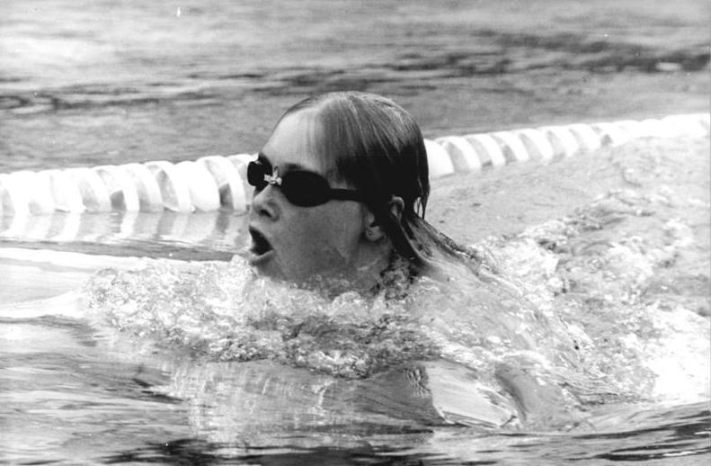 Ramona Reinke ADN-ZB Link 3-7-78 Berlin: 29. DDR-Meisteschaften im Sportschwimmen- Mit der schnellsten Vorlaufzeit von 2:38,63 min hofft nun Ramona Reinke (SC DHfK Leipzig) am 3.7.78 neue Titelträgerin im 200-m-Brustschwimmenzu werden. Am Vortag konnte sie bereits ihren Vorjahreserfolg über die 100-m-Distanz wiederholen (Siegerzeit: 1:12,89 min.) Abgebildete Personen: Reinke, Ramona: Schwimmerin, DDR